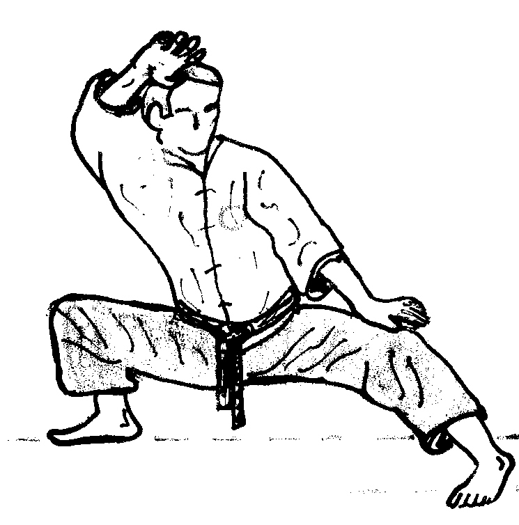 panthère0.jpg